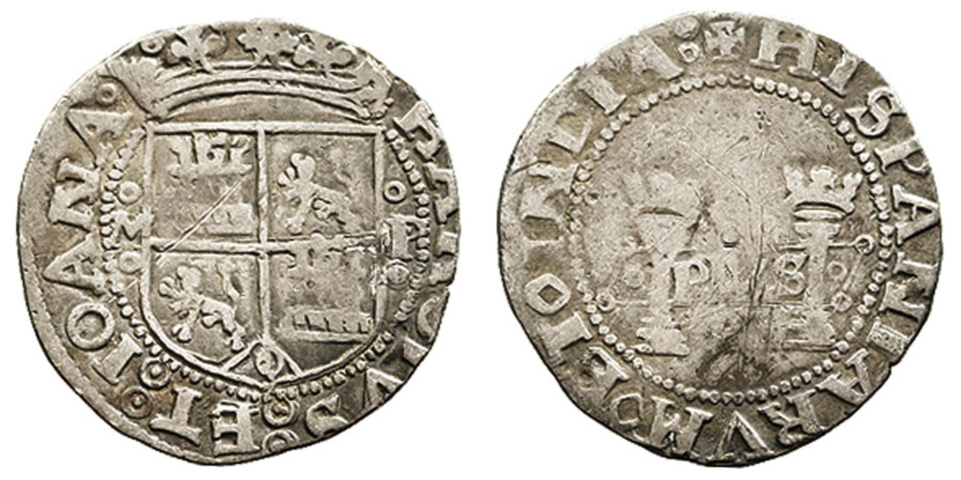 Moneda del reinado de Juana I de Castilla (reina nominal) y de su hijo Carlos I de España. Real de plata. Méjico P. Sin fecha. Fuente citada: Calicó, X. Numismática Española, 1474 a 2001. Barcelona, 2008, p.153.La leyenda dice: "KAROLVS ET IOANA" (anverso) "HISPANIARVM ET INDIA" (reverso); es decir, "Carlos y Juana, de las Españas y la(s) India(s)".